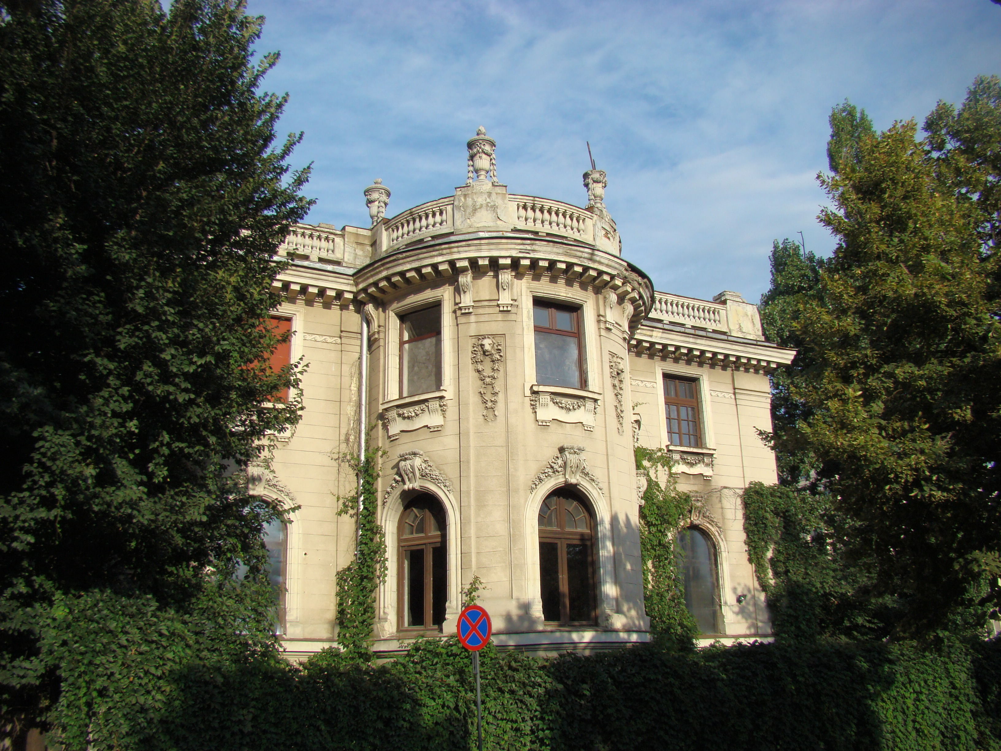 Clădire monument istoric, Bd.Aviatorilor, nr.8 (Casa Oromolu)